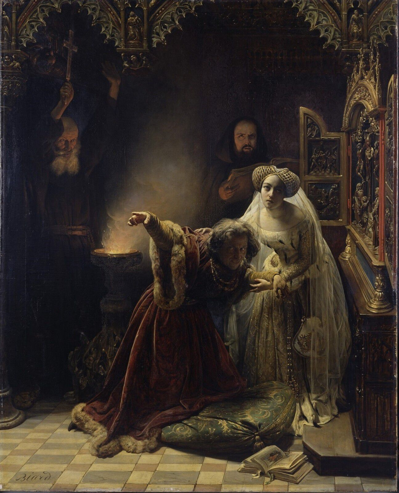 Exorcisme de Charles VI par deux moines augustins, détail d'une huile sur toile de François-Auguste Biard.